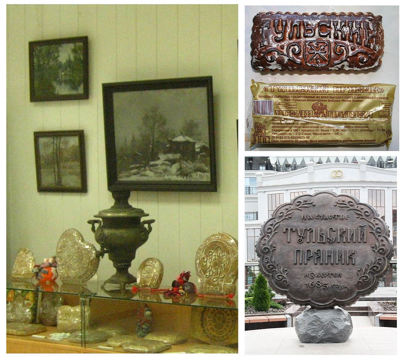 Piernik tulski - montaż